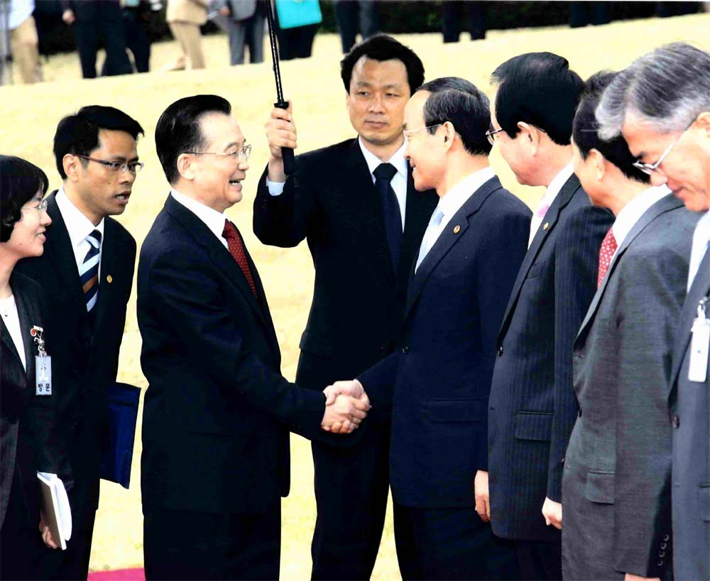 송민순과 원자